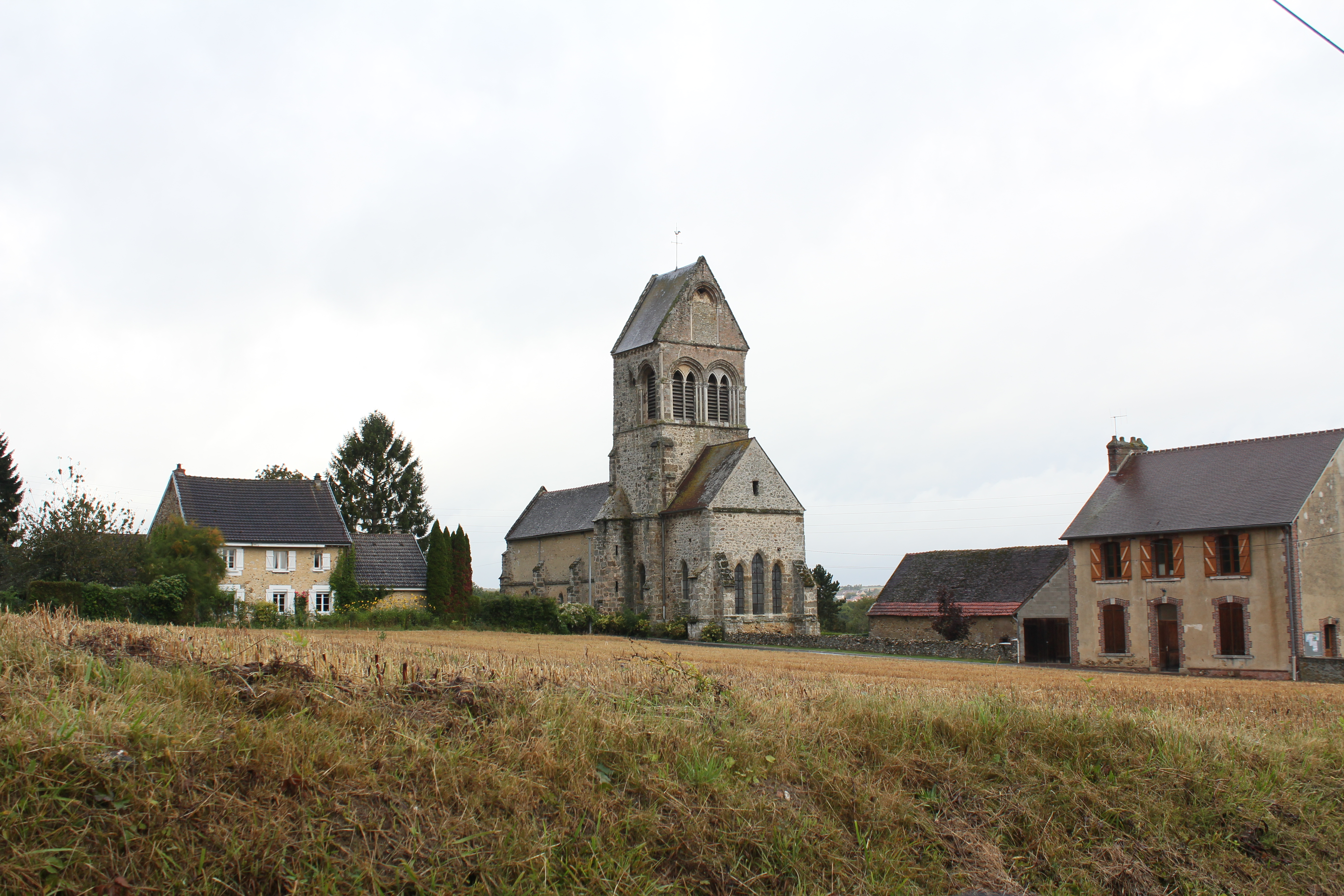 Église Notre-Dame de Corribert, (Classé, 1979) .